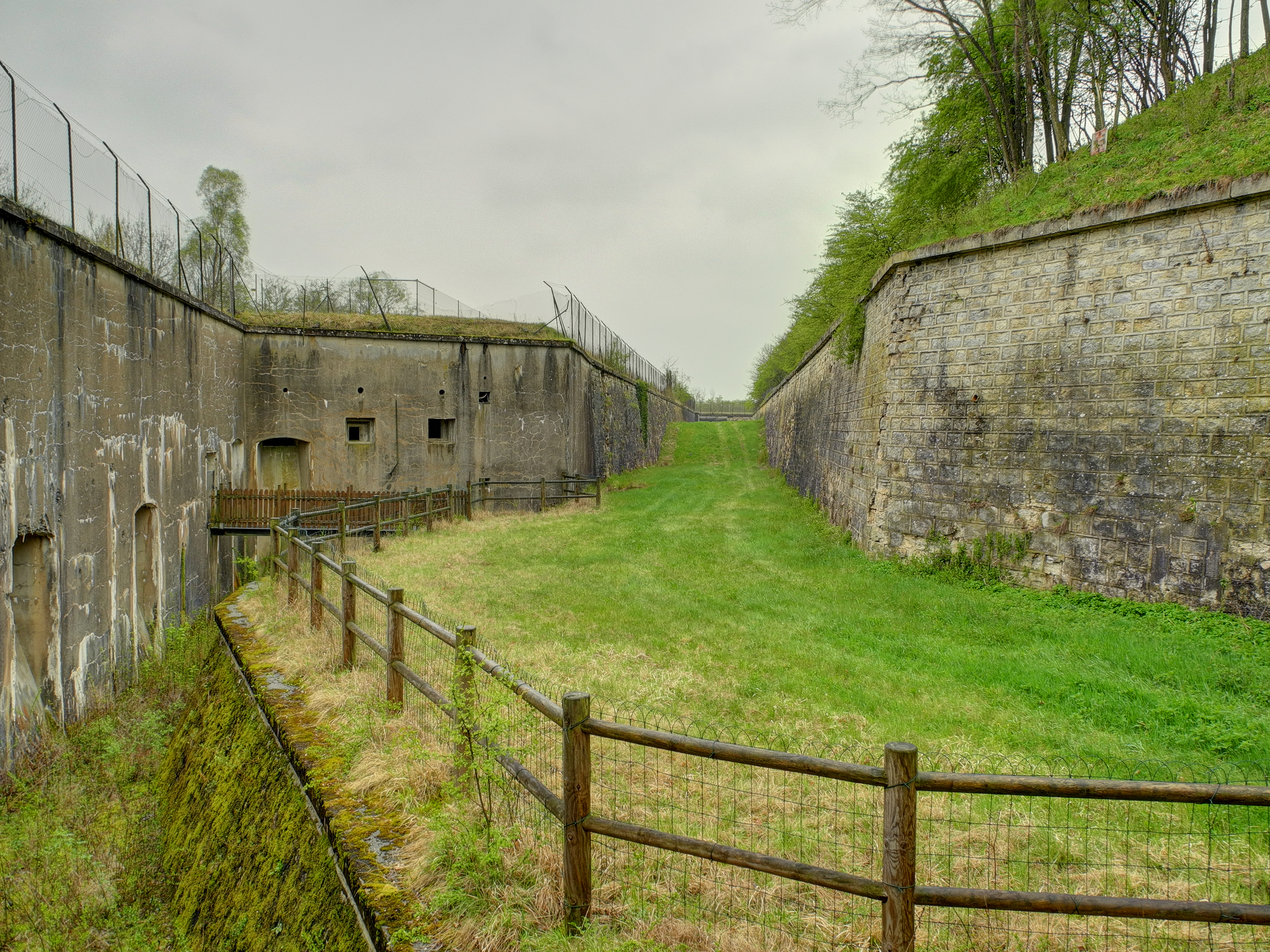 Fort de Vézelois : vue depuis le coffre de contrescarpe double, en direction du Sud (HDR).